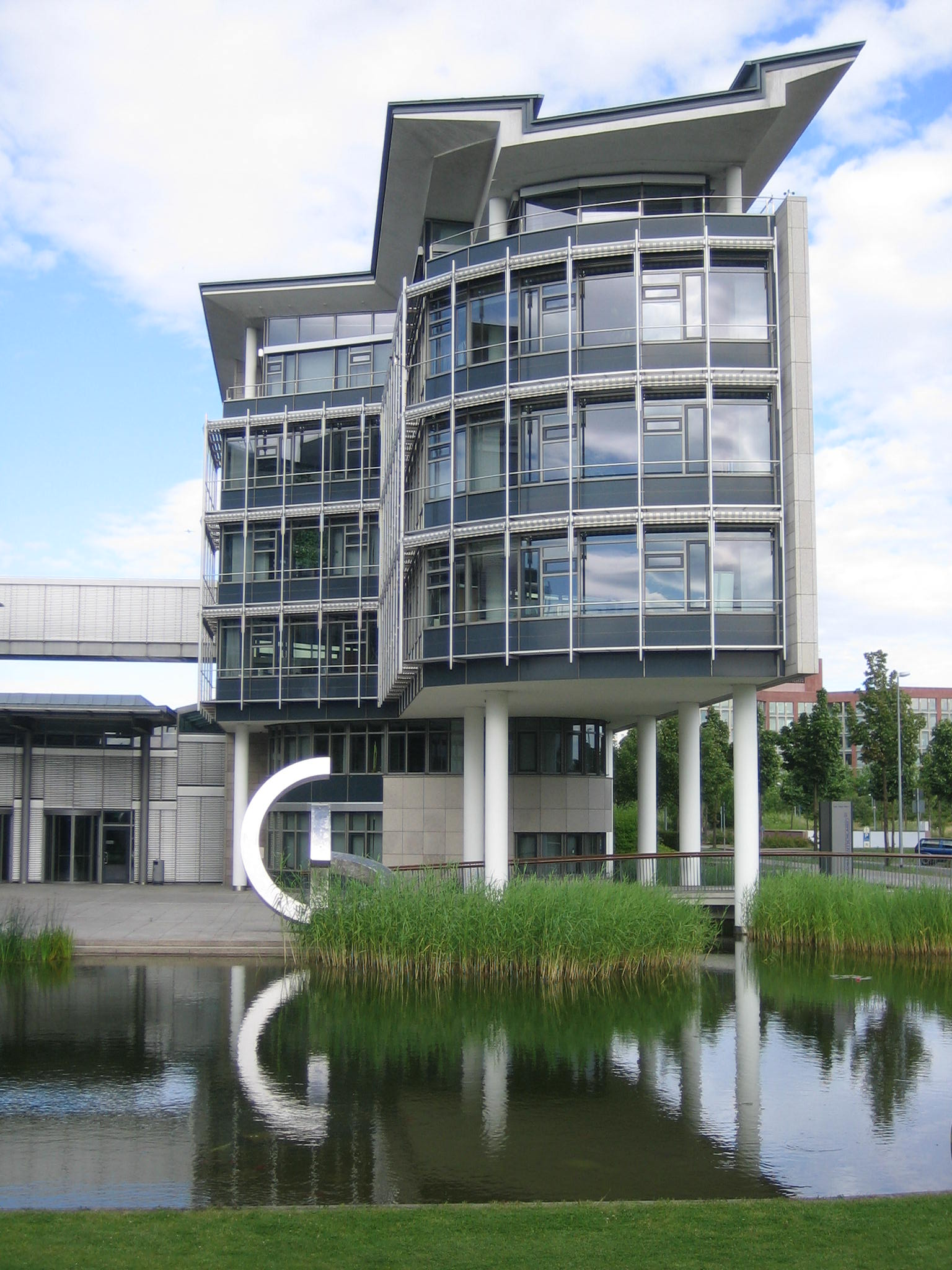 zeitgenössisches Verwaltungsgebäude der Coface Deutschland